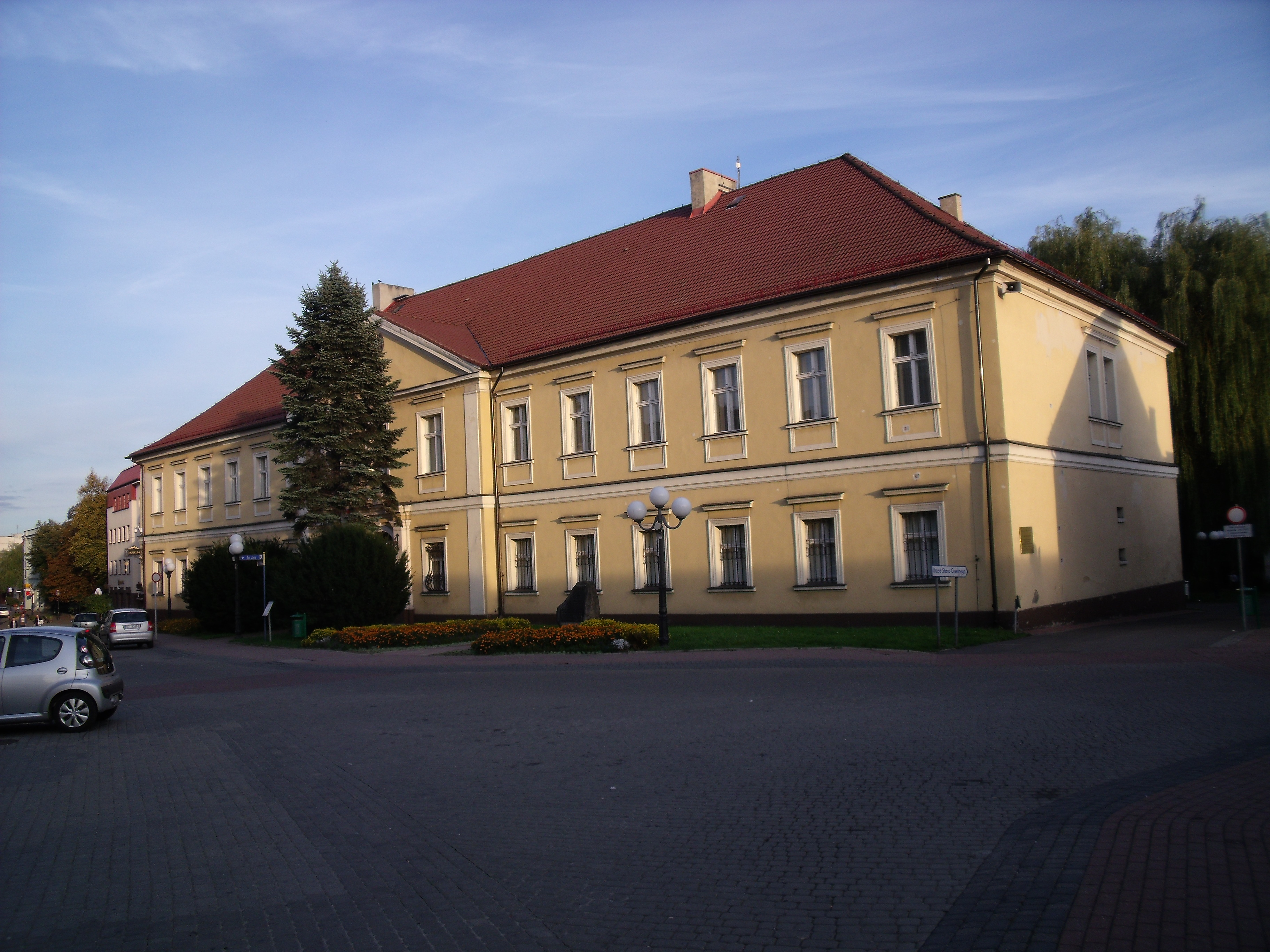 Obecnie muzeum regionalne.